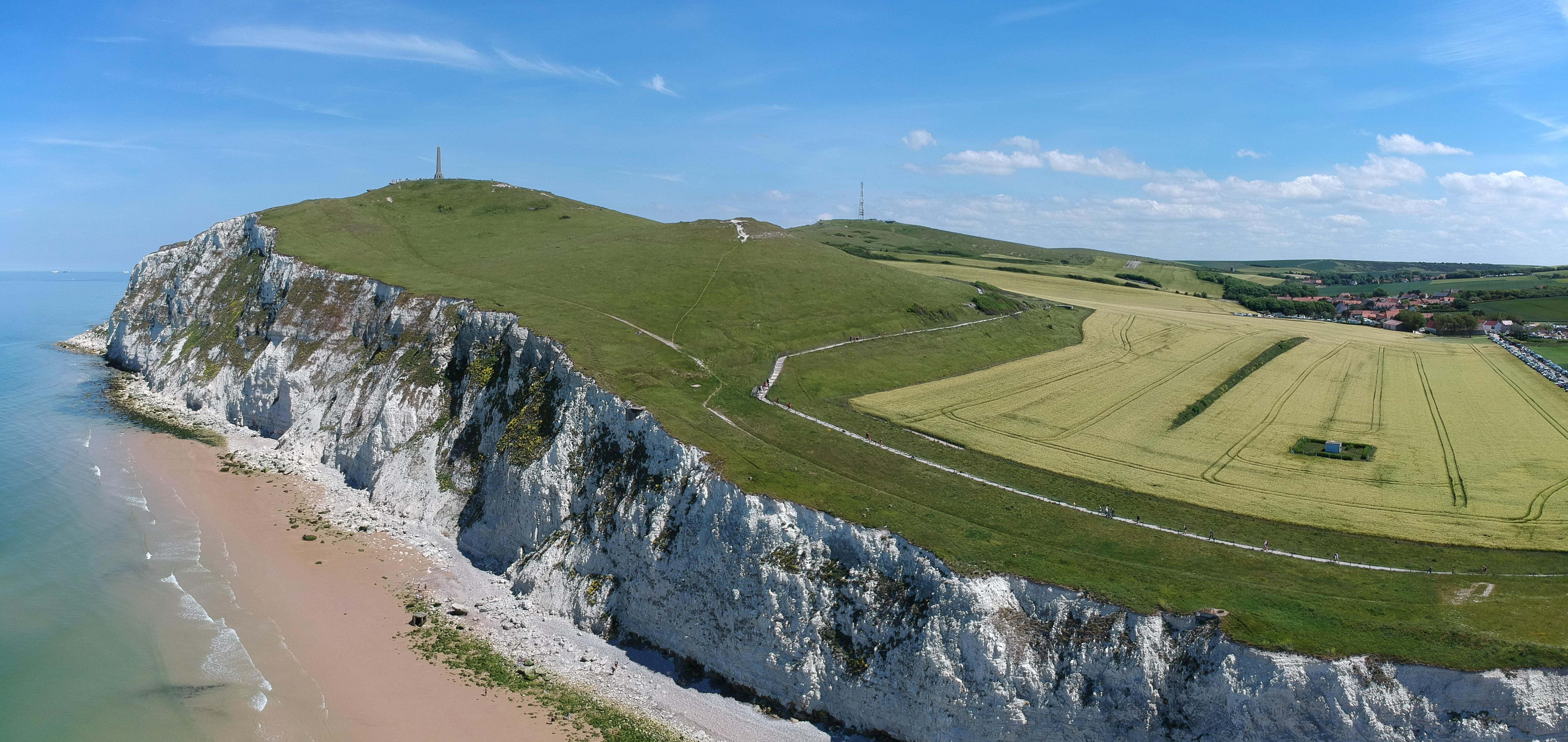 Cap Blanc-Nez vue d'un drone